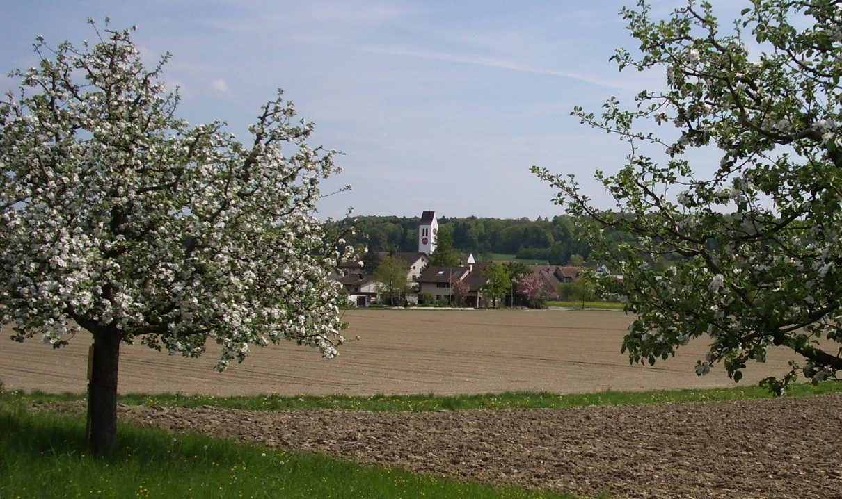 Ossingen ZH, Switzerland